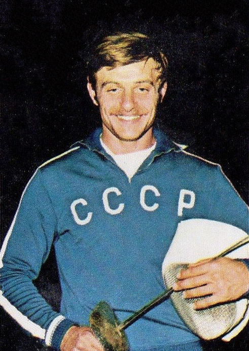 CAMPIONI dello SPORT 1973/74-Figurina n.326- SIDIAK-URSS-SCHERMA